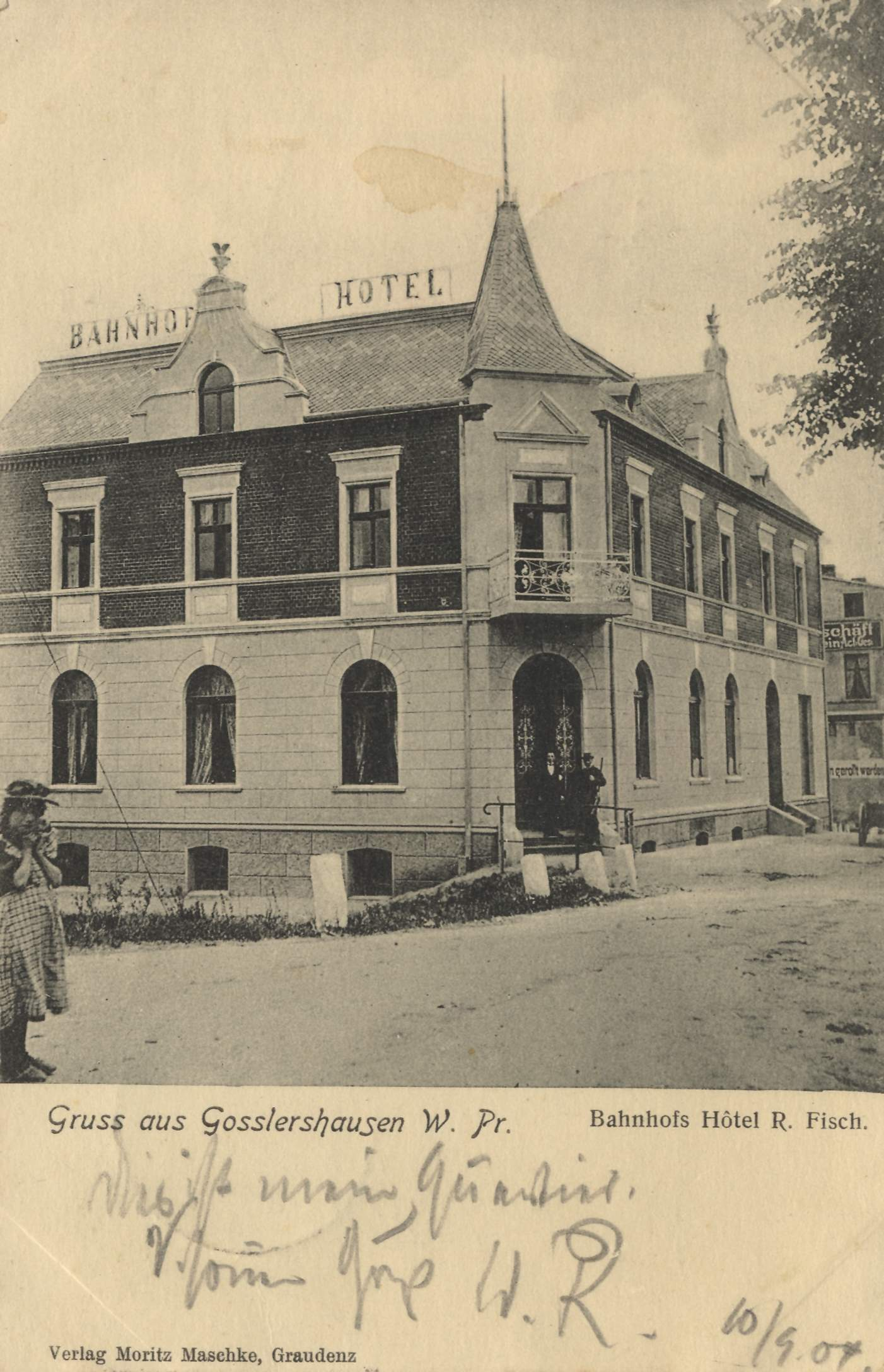 Bahnhofshotel R. Fisch